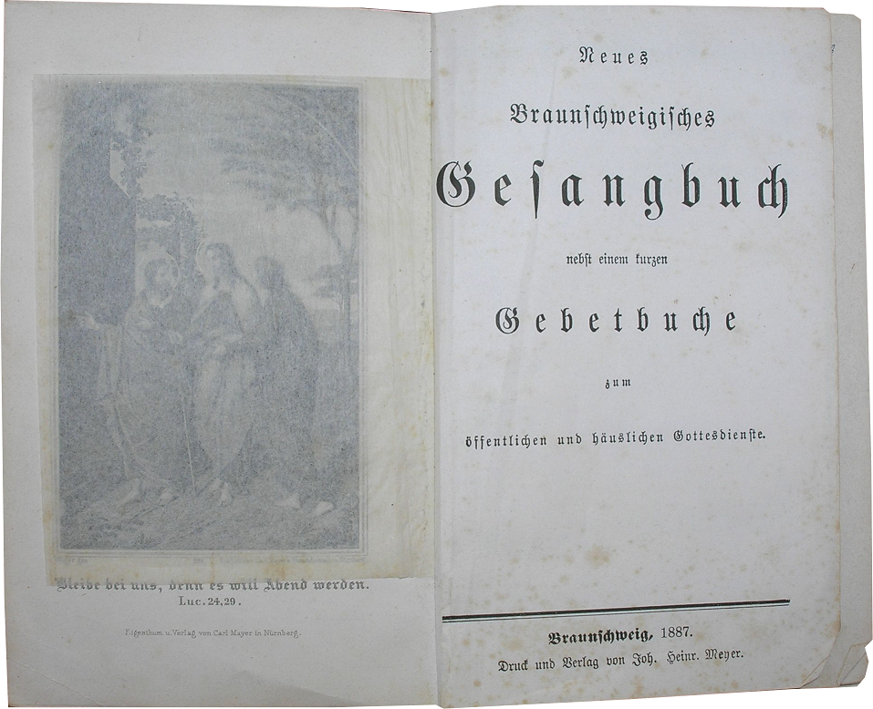 Titelblatt des Neuen Braunschweigischen Gesangbuchs, Druck 1887 (Erstausgabe zu Ostern 1780); linke Seite mit Seidenpapier abgedeckt, ein Stahlstich von Carl Mayers Kunstanstalt in Nürnberg, gezeichnt von Wüger.